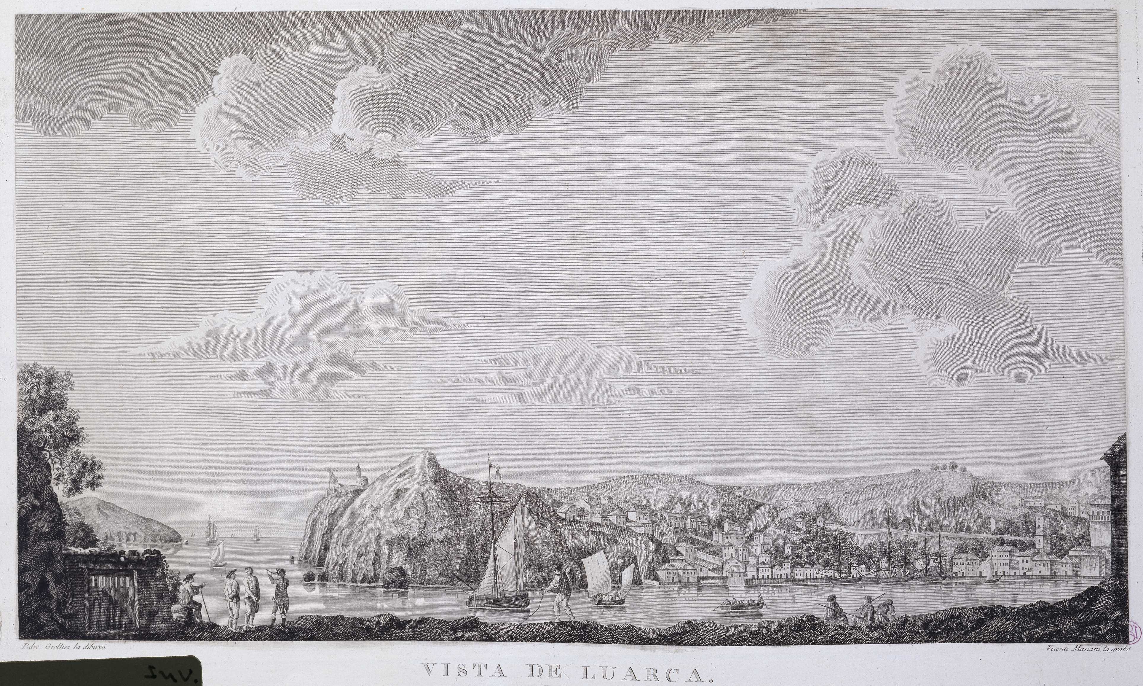 Vista de Luarca, grabado de Vicente Mariani según Pedro Grolliez para la serie de vistas de puertos de España de la Real Calcografía. Biblioteca Nacional de España.